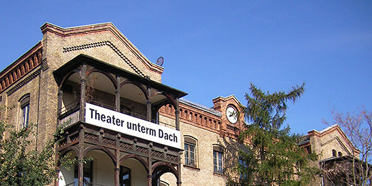 Theater unterm Dach in der Danziger Straße 103 mit Balkon